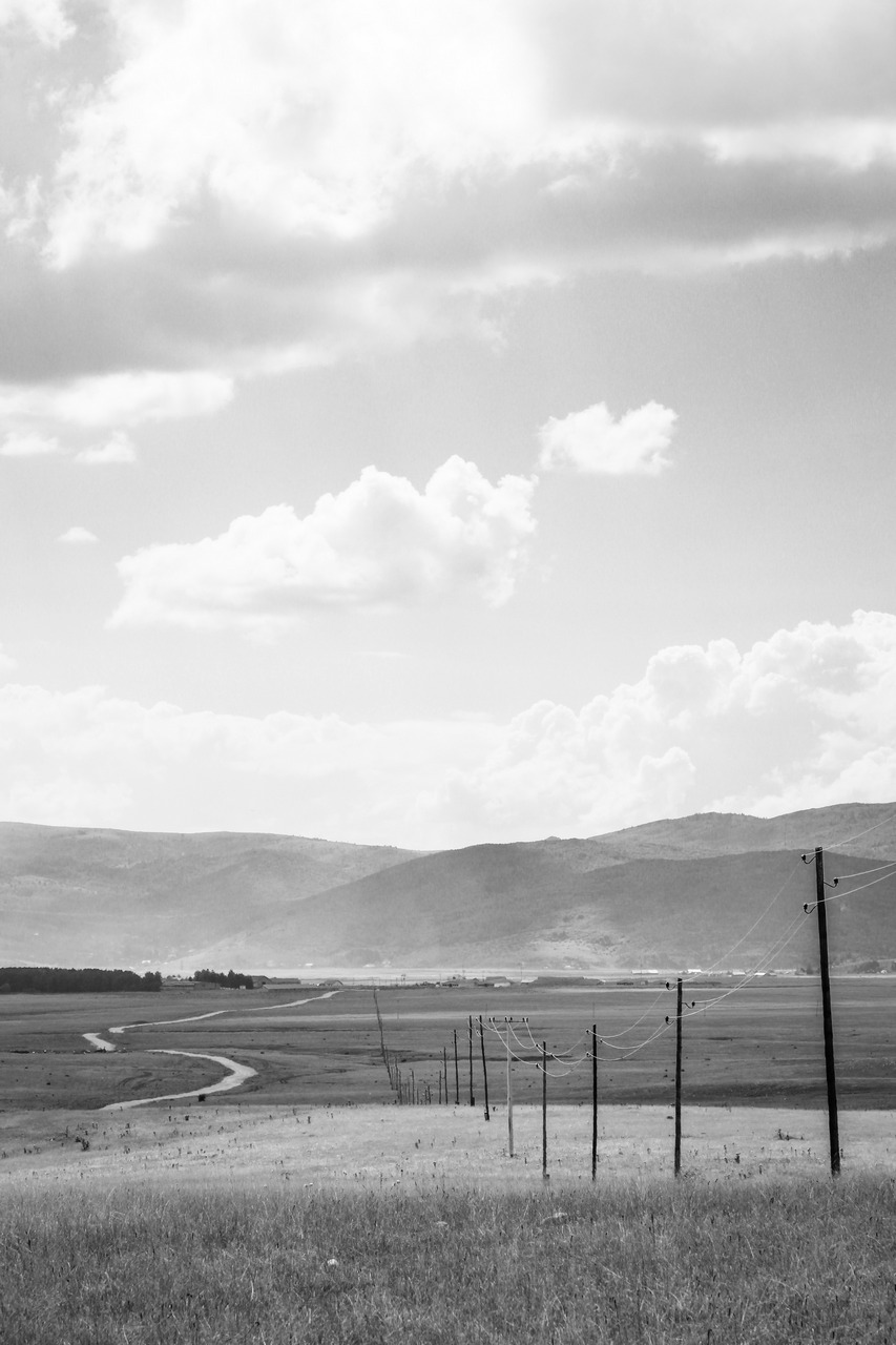 Ово је фотографија заштићеног природног добра у Србији под шифром: РП59 This is a a photo of a natural area in Serbia with ID: РП59 Специјални резерват природе Пештерско поље